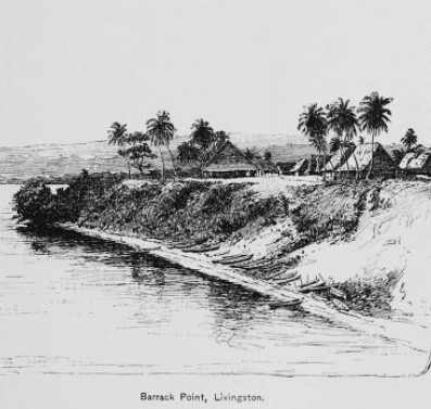 Grabado del libro Guatemala, the land of quetzal de William T. Brigham, publicado en 1887. Barrack Point en Livingston, Izabal en 1884.